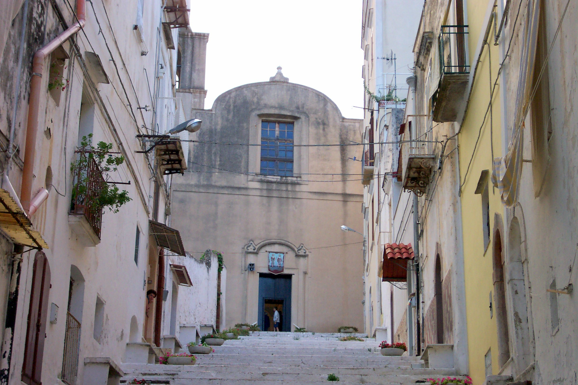 Gaeta, Lazio, Italy - Santa Maria di Porto Salvo